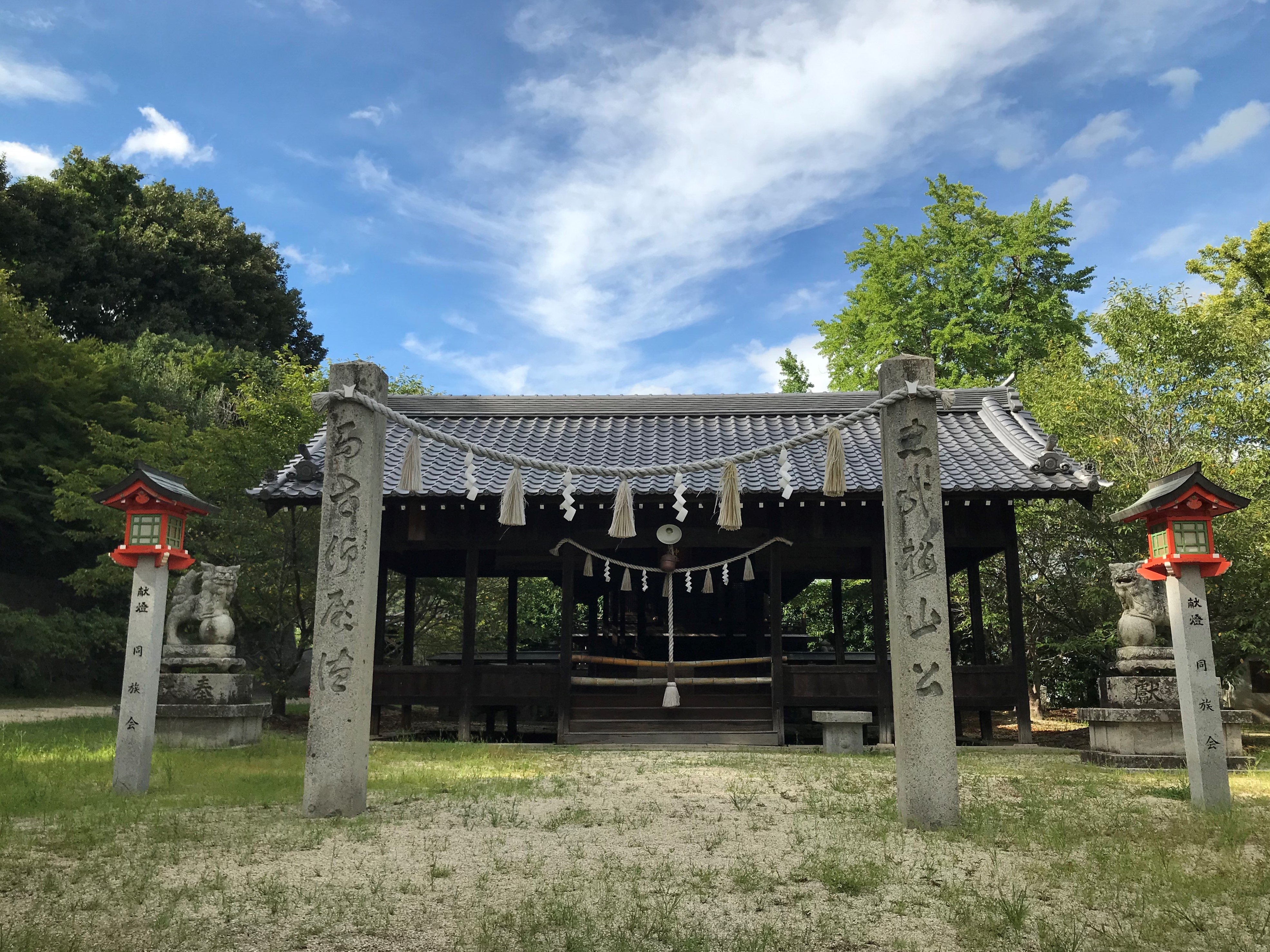 吉備津神社境内にある。